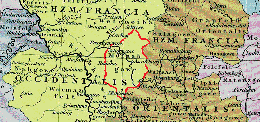 Lage des Maingaus im Herzogtum Westfranken (um 1000 n. Chr.)